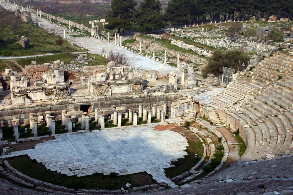 35920 Acarlar/Selçuk/İzmir, Turkey